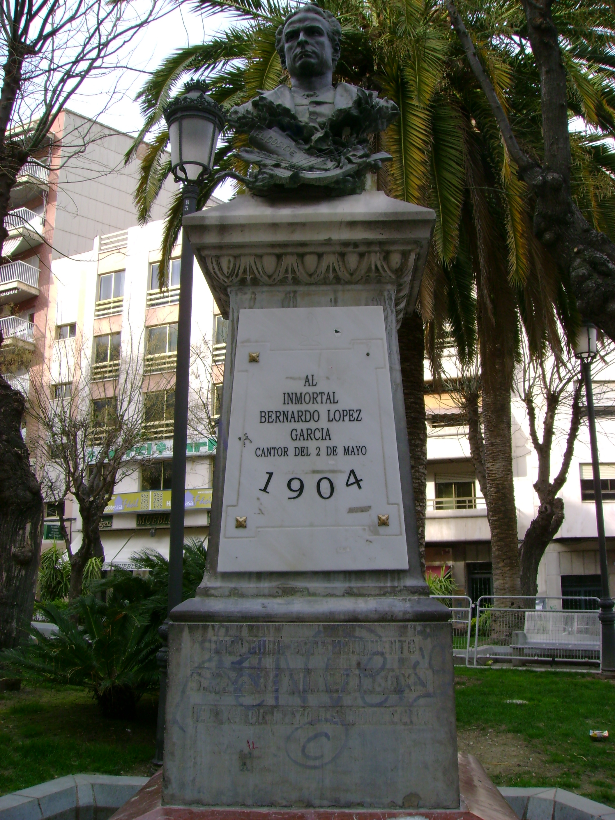 Monumento a Bernardo López García, en Jaén.